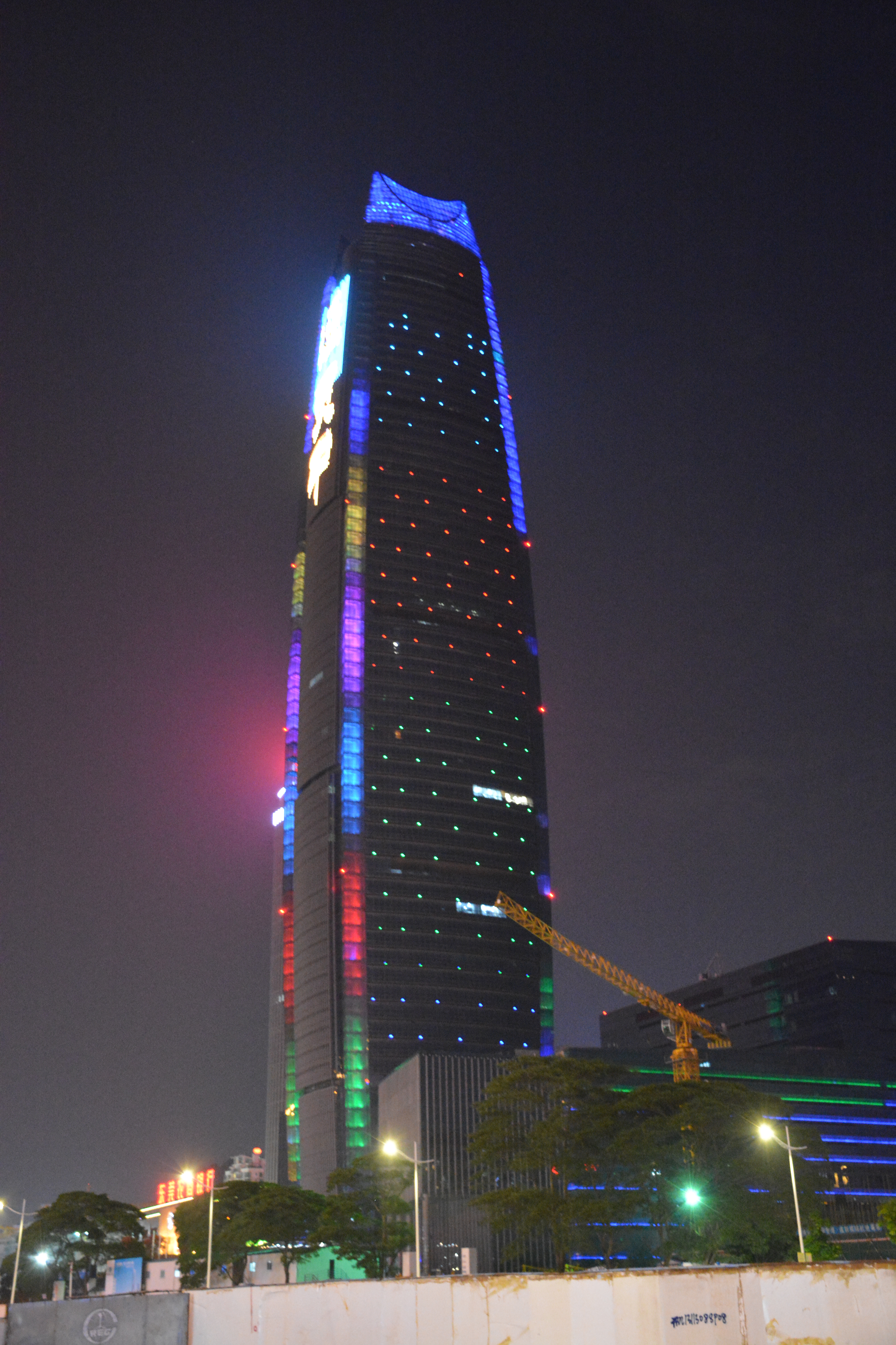 Dongguan Financial Tower, by Hervé Tordjman Architecte Night View 01